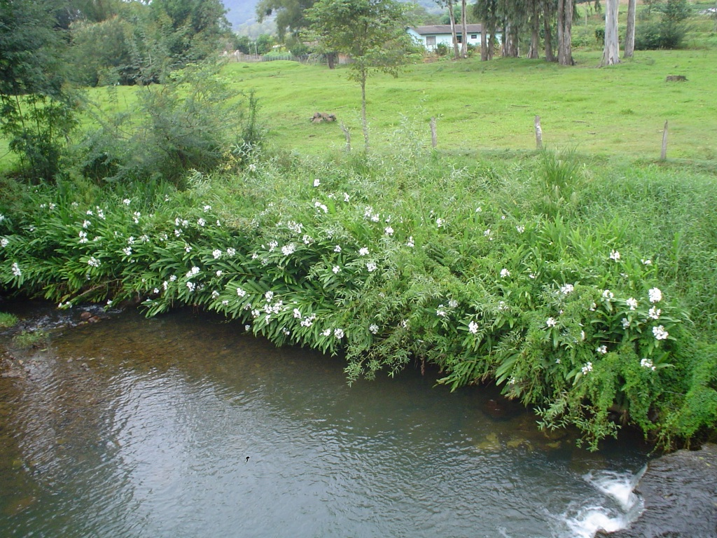 Talude fluvial estabilizado por técnicas de Bioengenharia de Solos (Vale Vêneto-RS / Brasil)